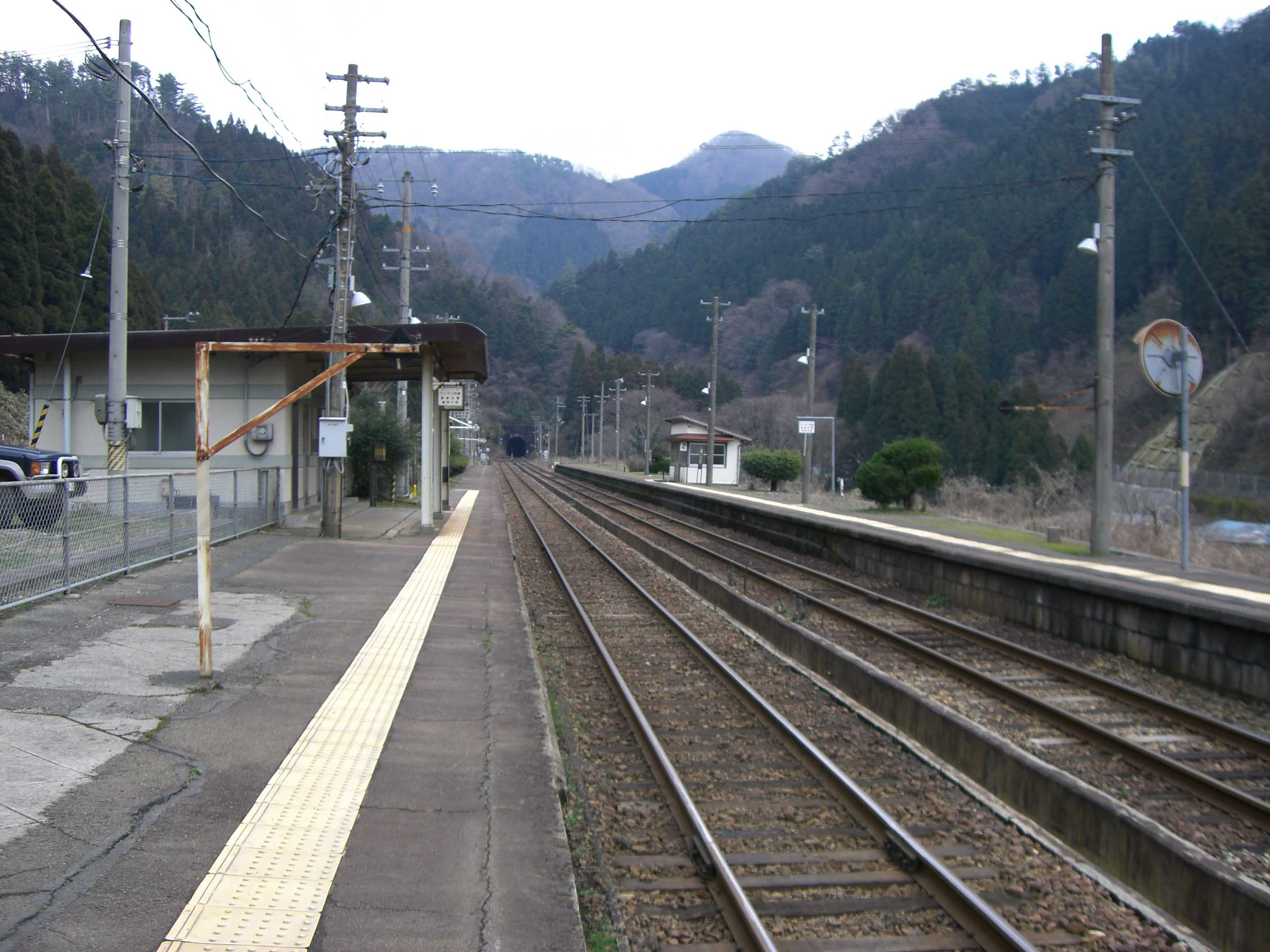 久谷駅の構内の様子